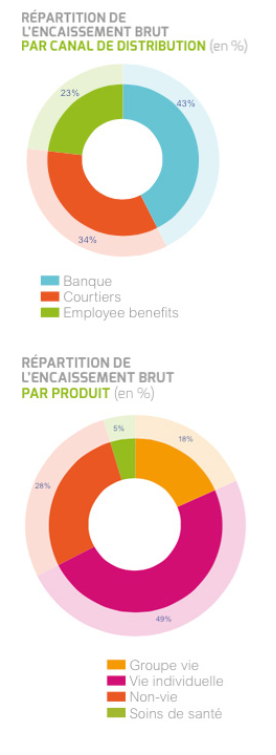 AG Insurance - stats (2014)